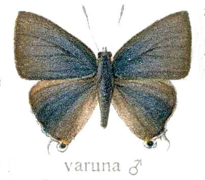 Rapala varuna